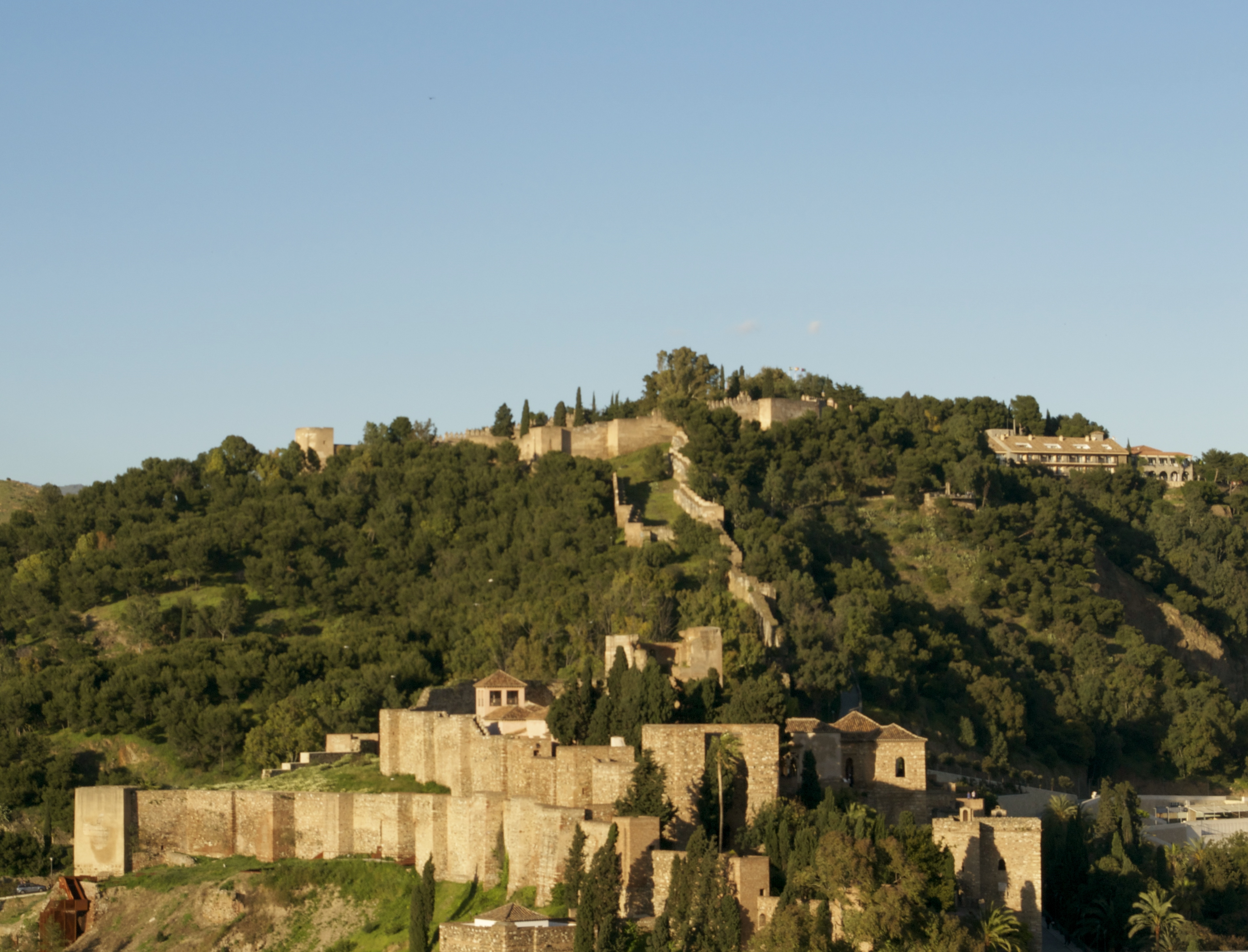 Alcazaba y Castillo de Gibralfaro, Málaga, España.